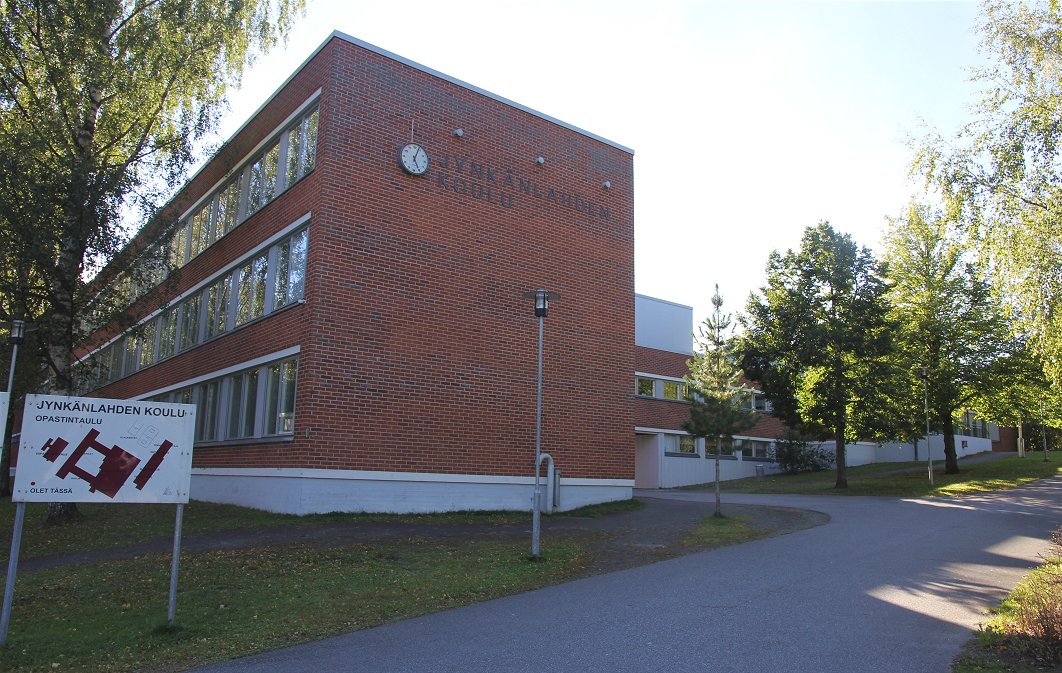 Jynkänlahden koulu on Kuopion Jynkän kaupunginosassa toimiva, alkujaan vuonna 1968 rakennettu suomenkielinen yläkoulu (luokka-asteet 7–9). Kouluun kuuluu kolme rakennusta, joista keskimmäisin ja suurin näkyy kuvassa.